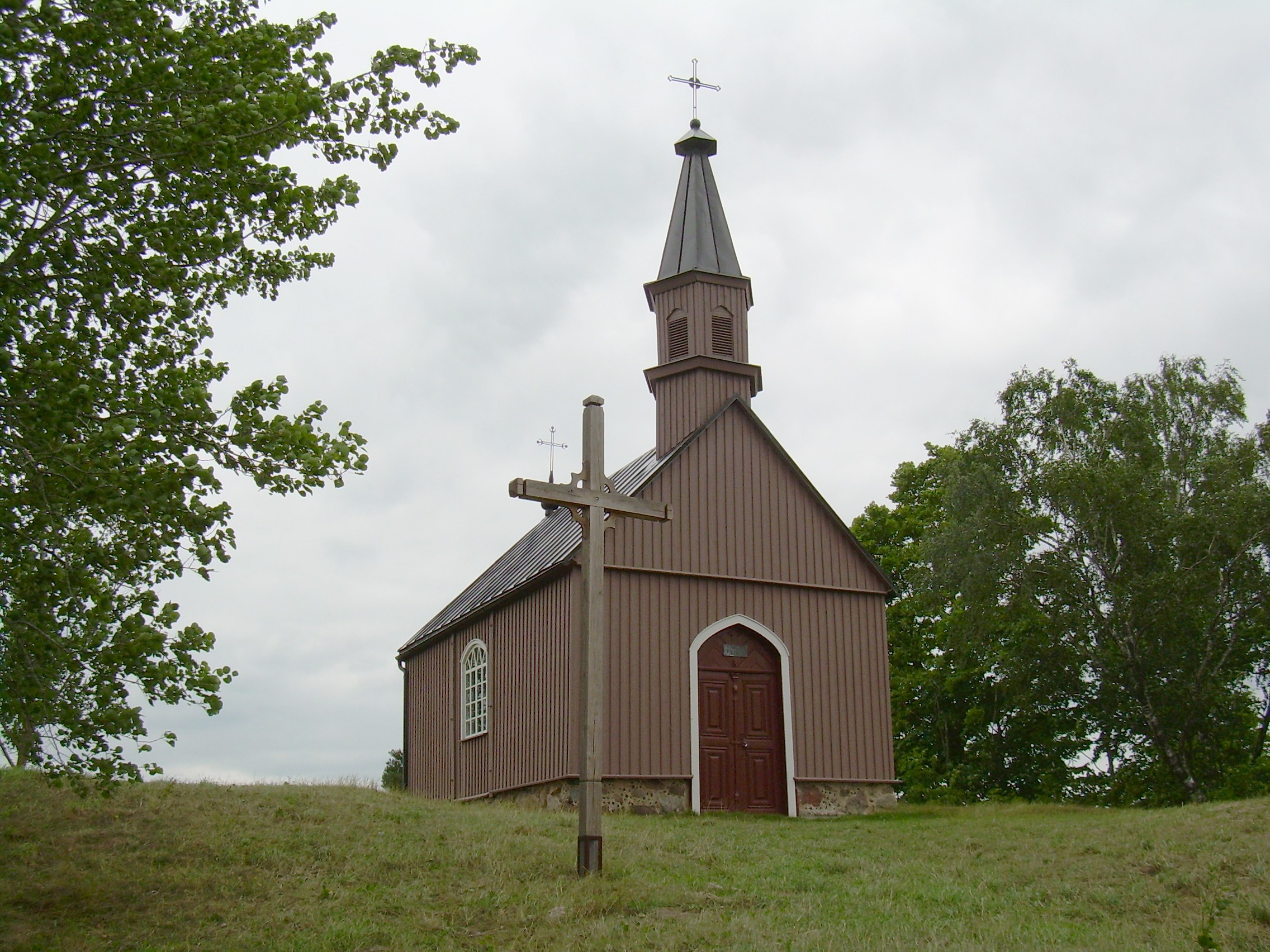 Žemaičių Kalvarijos Švč. Mergelės Marijos Apsilankymo mažoji bazilika